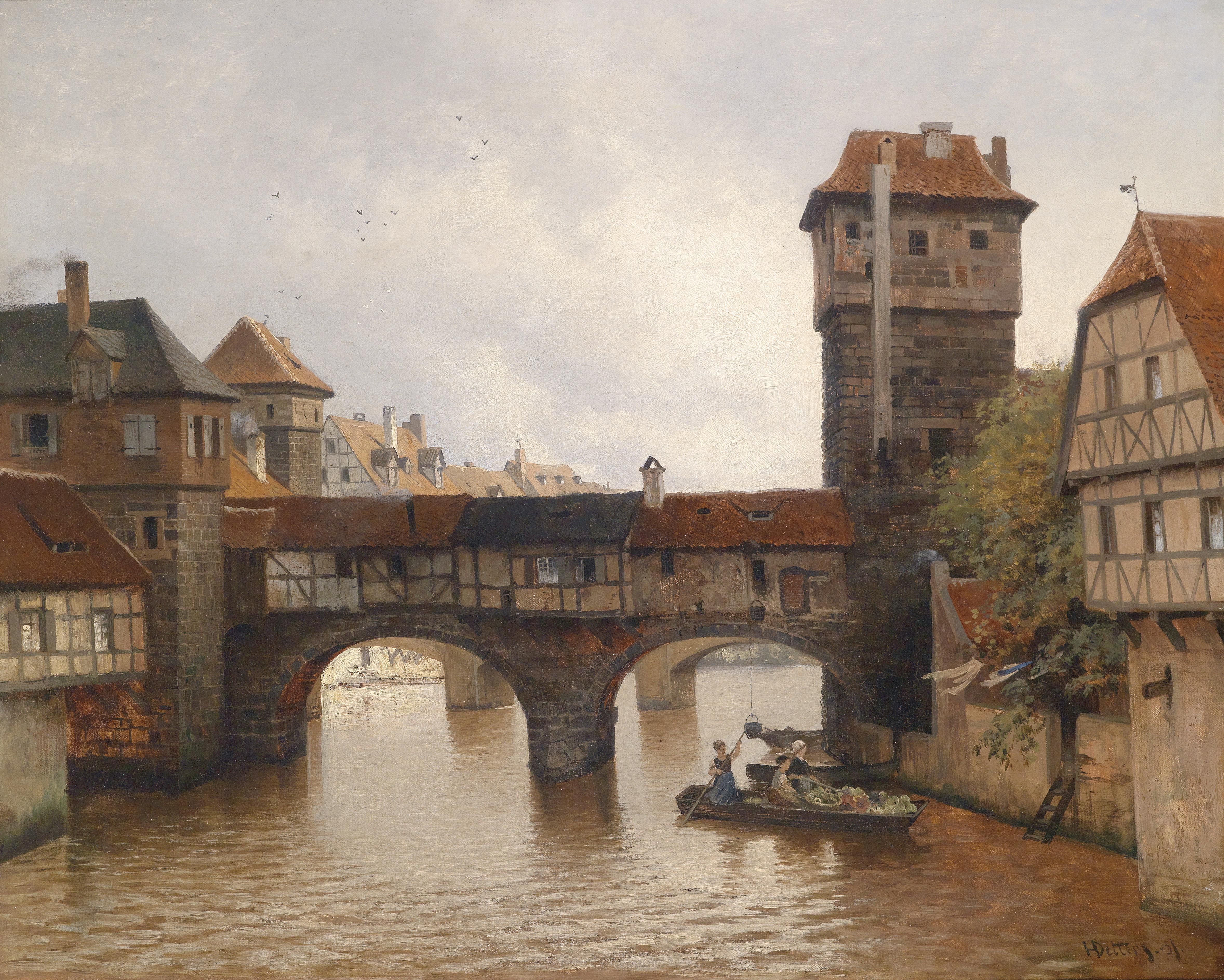 Der Henkersteg in Nürnberg, signiert H. Deiters (ligiert), undeutlich datiert (19)01 (?), Öl auf Leinwand, 56,5 x 70 cm